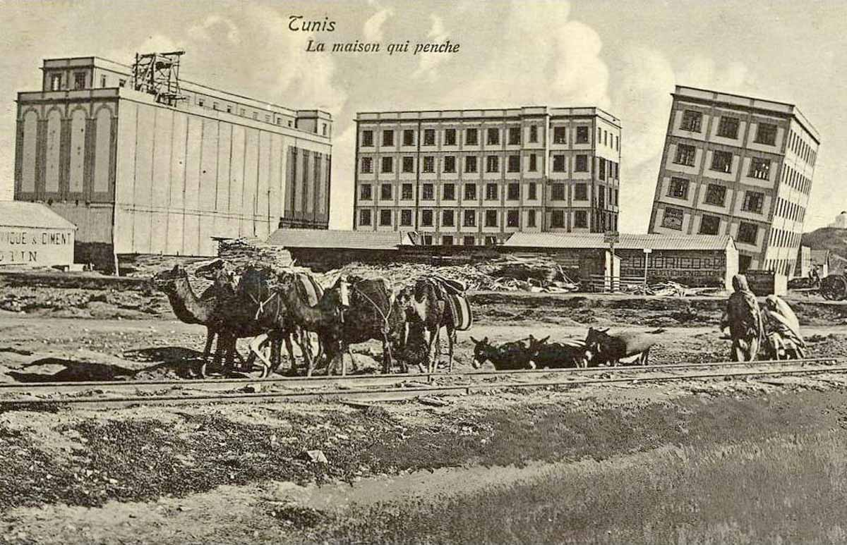 Tunis Minoterie du quartier de la Petite Sicile